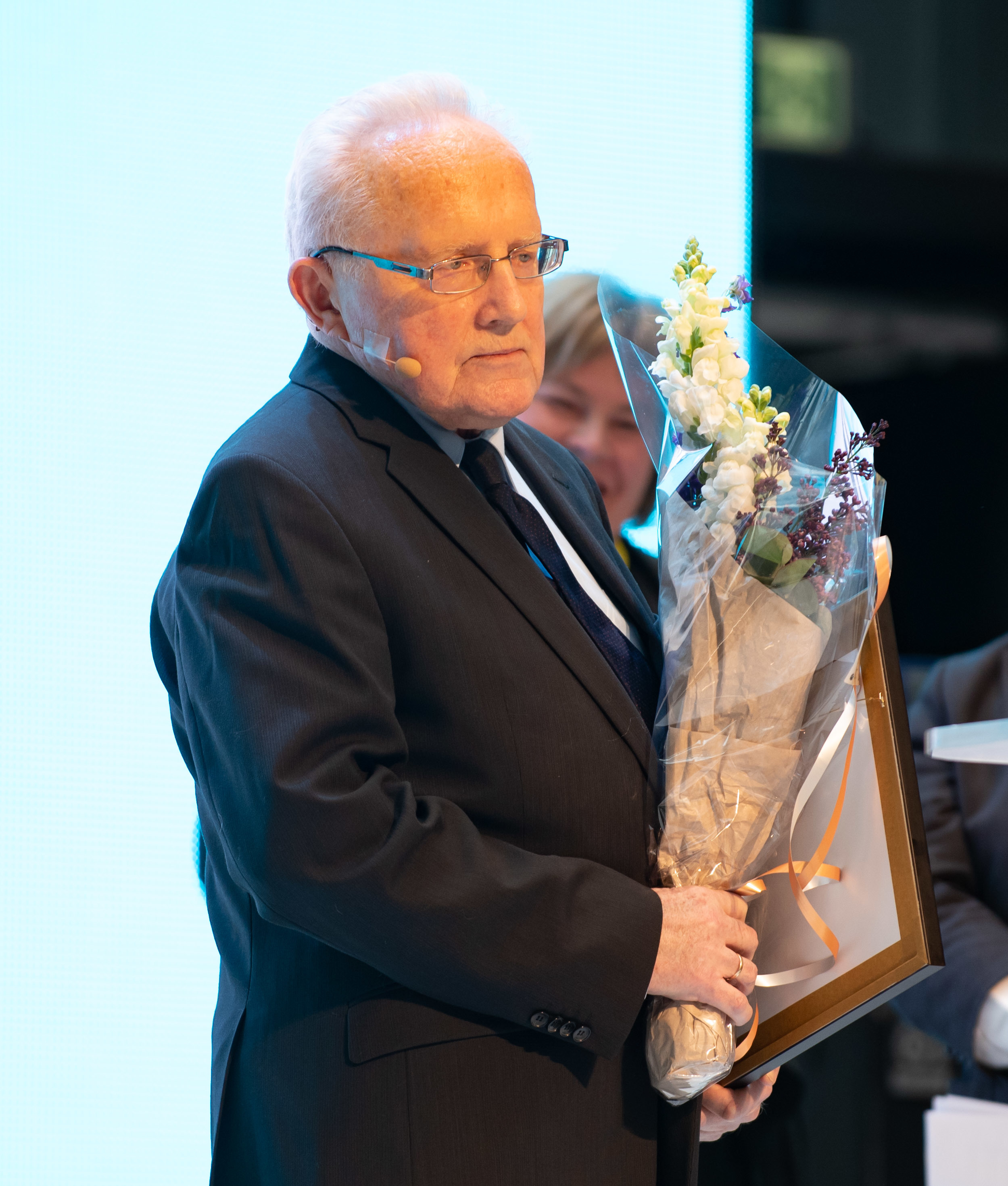 Per Egil Hegge, Harald Stanghelle.